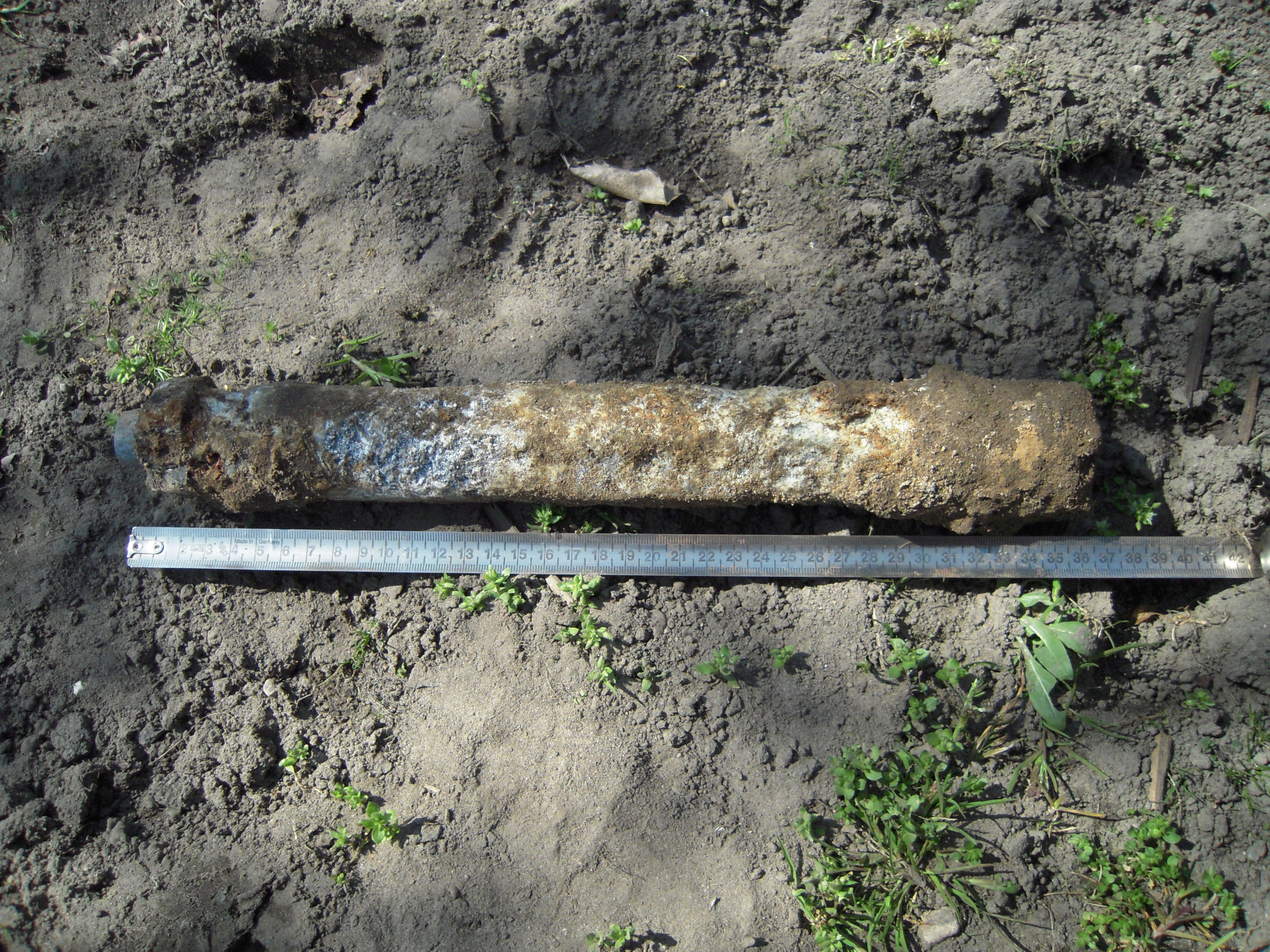 Britische Stabbrandbombe INC 4 LB (1,8 kg), Blindgänger aus einem Berliner Kleingarten. Fund im April 2010 in ca. 0,75 m Tiefe in der Berliner Kleingarten-Kolonie "Lebensfreude"